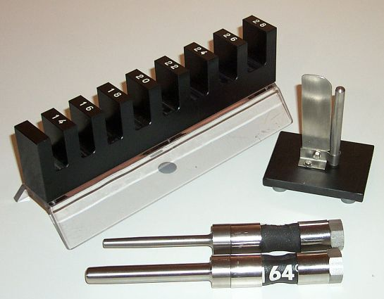 Darmsortiergerät